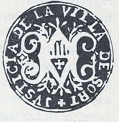 Segell del Justícia de Sort (Sort, Pallars Sobirà)